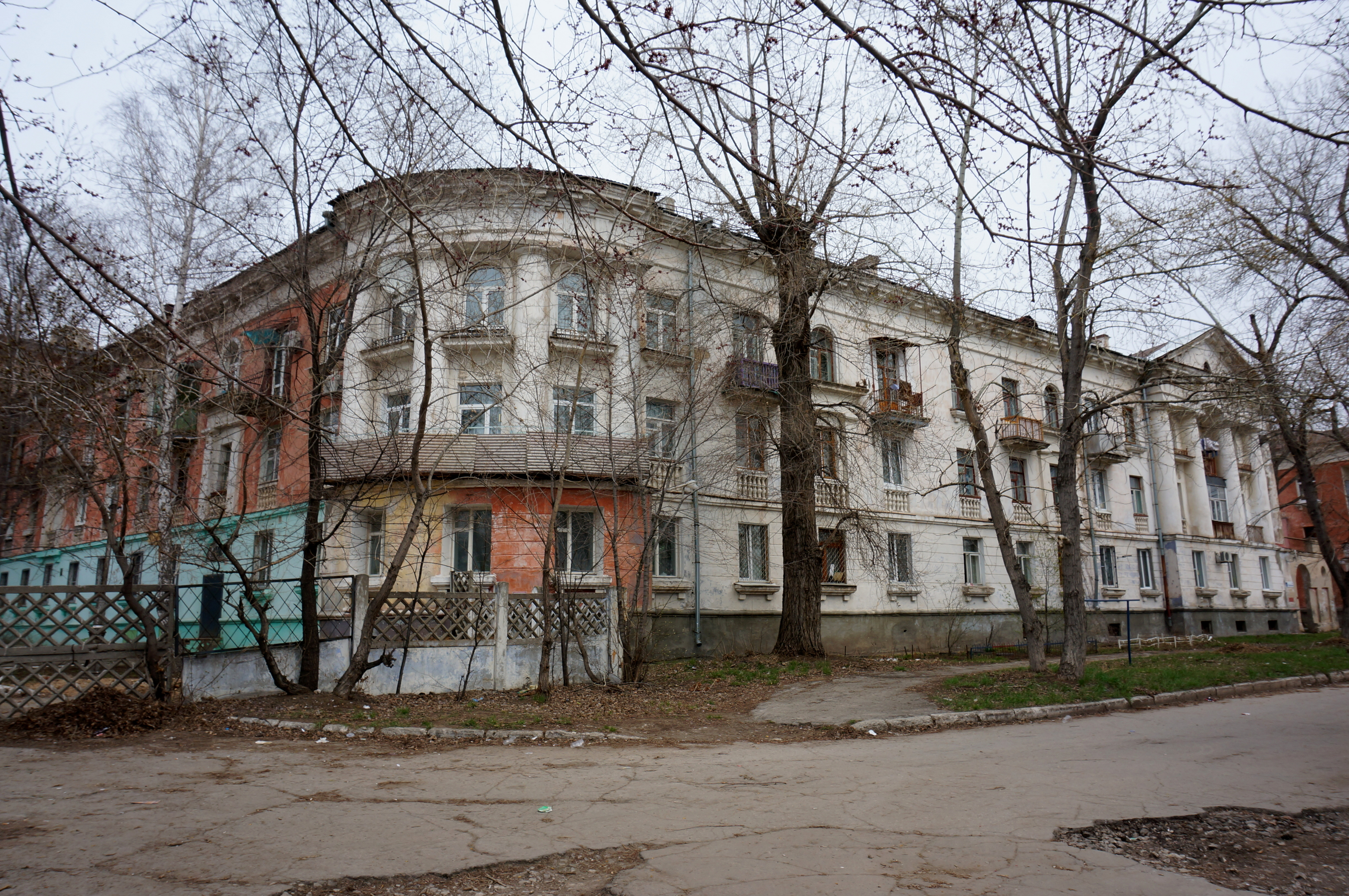 Россия, Тольятти, ул. Носова 1/ул. Никонова 2. Жилой дом Г-образной формы. Главный фасад округлой конфигурации, симметричен, смотрит на Волгу.